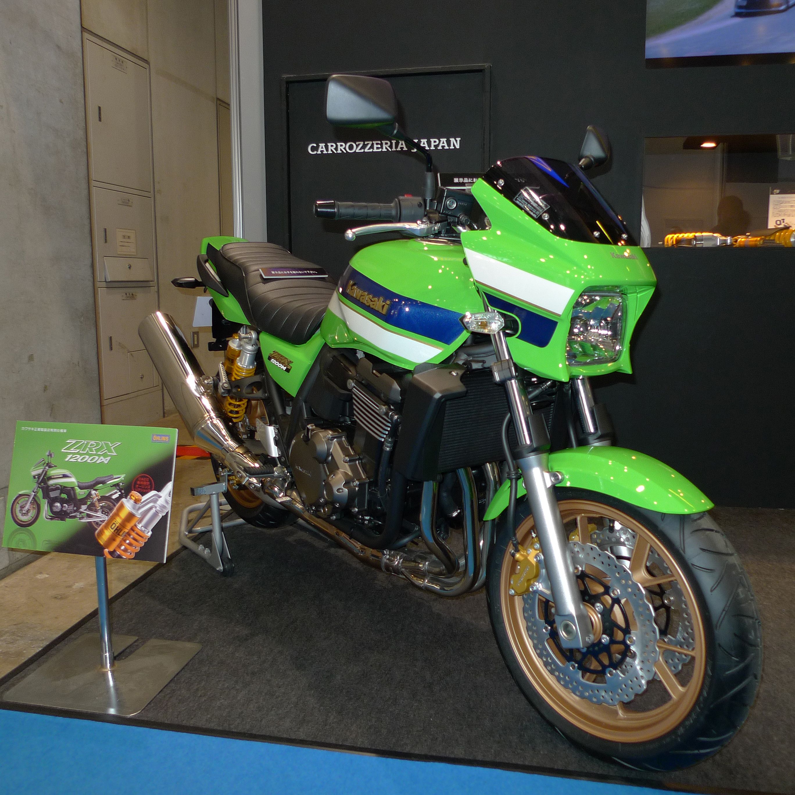 カワサキ・ZRX1200 DAEG Z 2012 東京モーターショー2011にて撮影